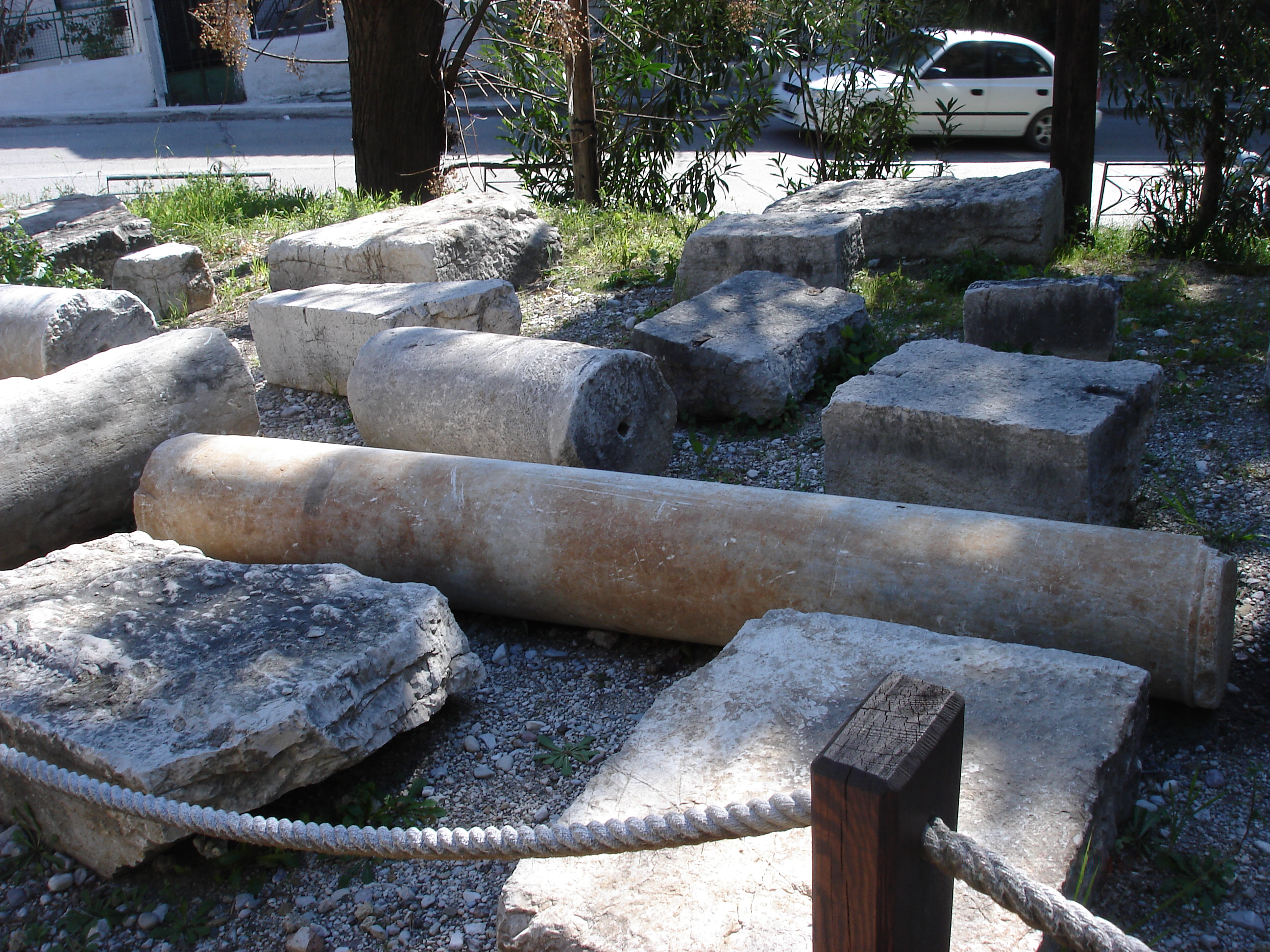 Patras Fortress Greece Το κάστρο της Πάτρας